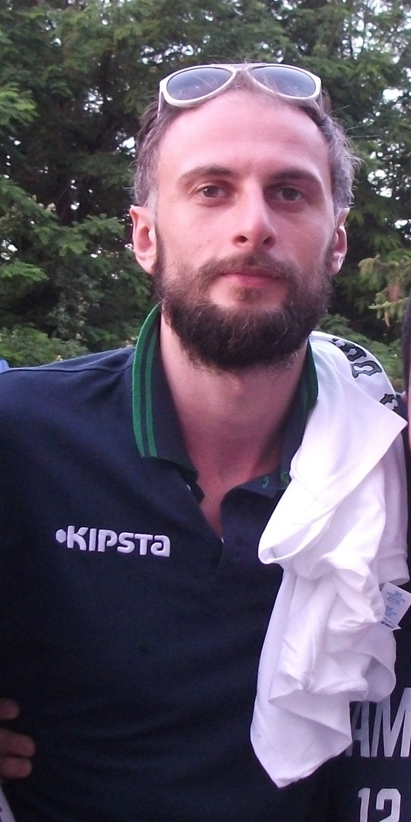 Vik'tor Sanik'idze durante i festeggiamenti del 21 giugno 2013 per lo scudetto 2012/13 vinto della Mens Sana Basket.